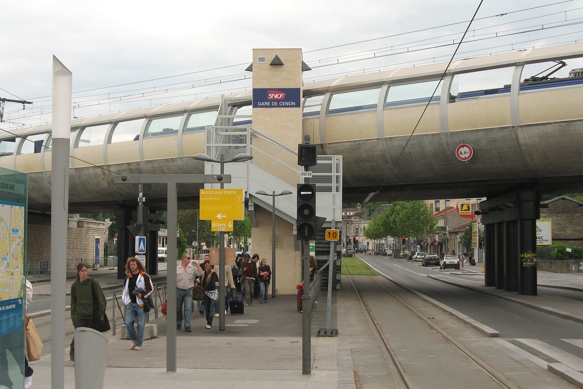 Vue de l'accès SNCF de la gare de Cenon depuis les quais du tramway.